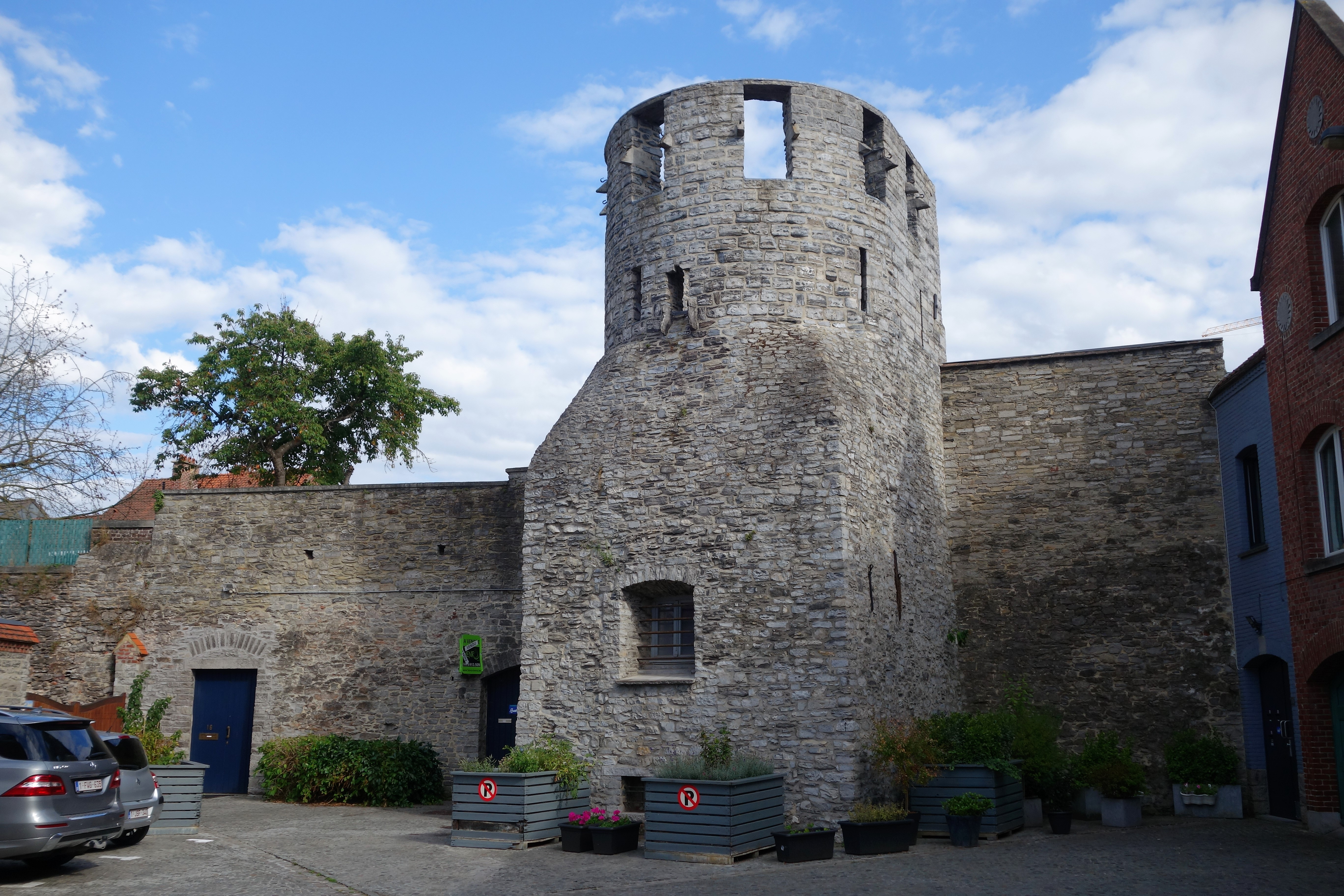 rue des Fossés, n°19 à Tournai (propriété privée)